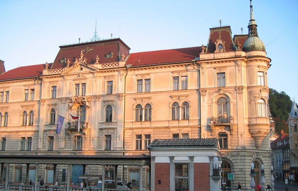 Kresija, Ljubljana photo: Ziga 21:14, 27 April 2006 (UTC)